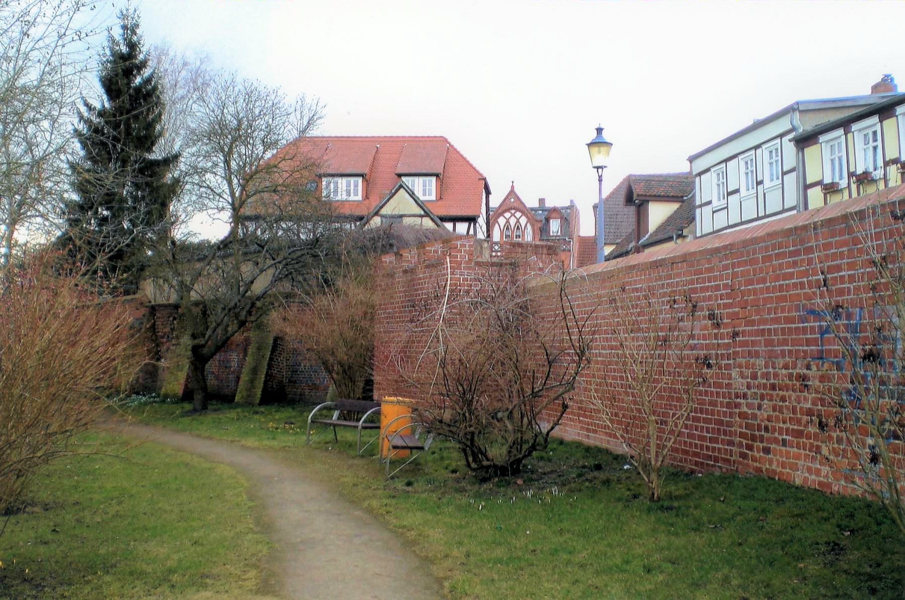 Seehäuser Stadtmauer